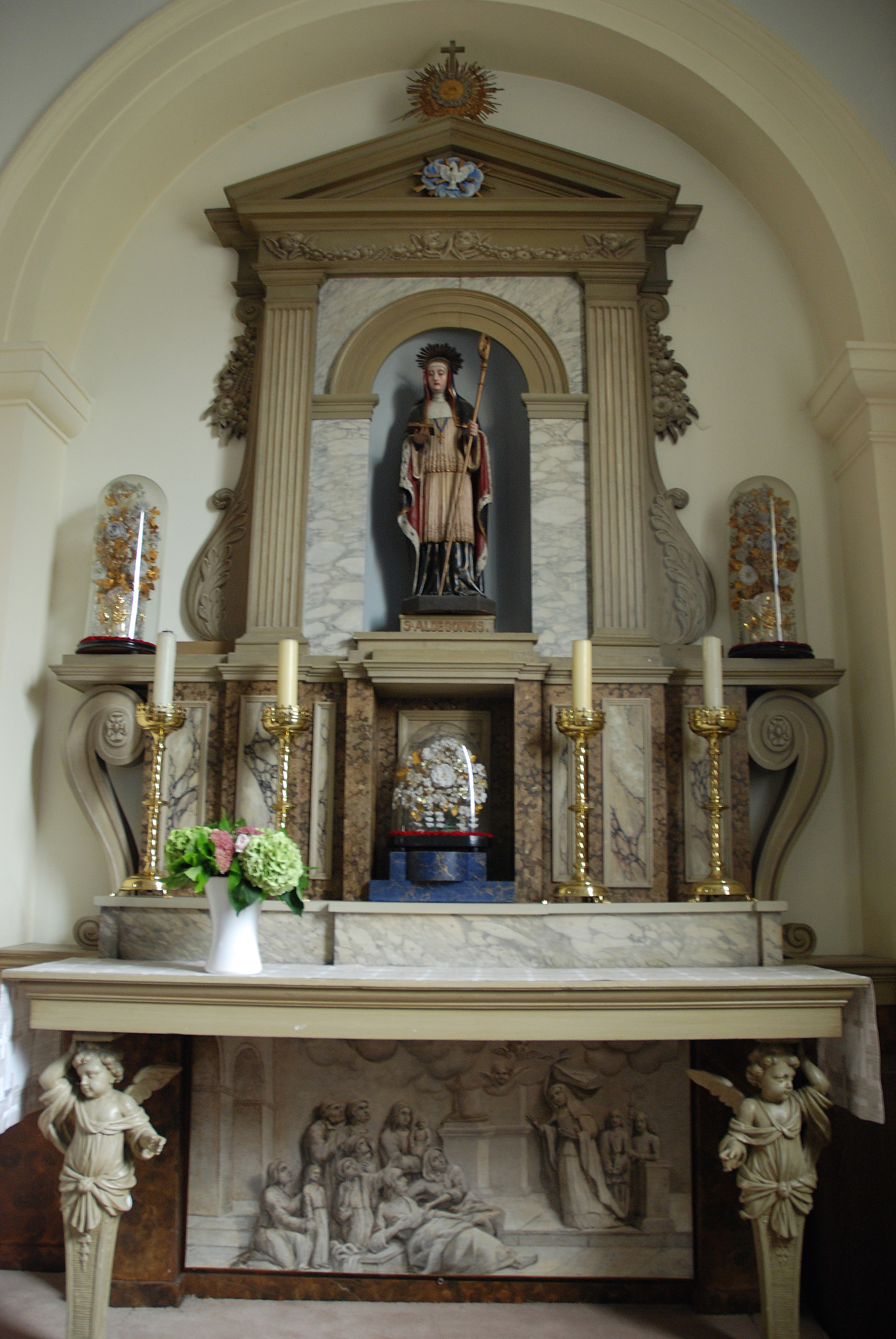 Aldegonda van Maubeuge (Aldegondis) in de Sint-Aldegondiskerk in Deurle, België